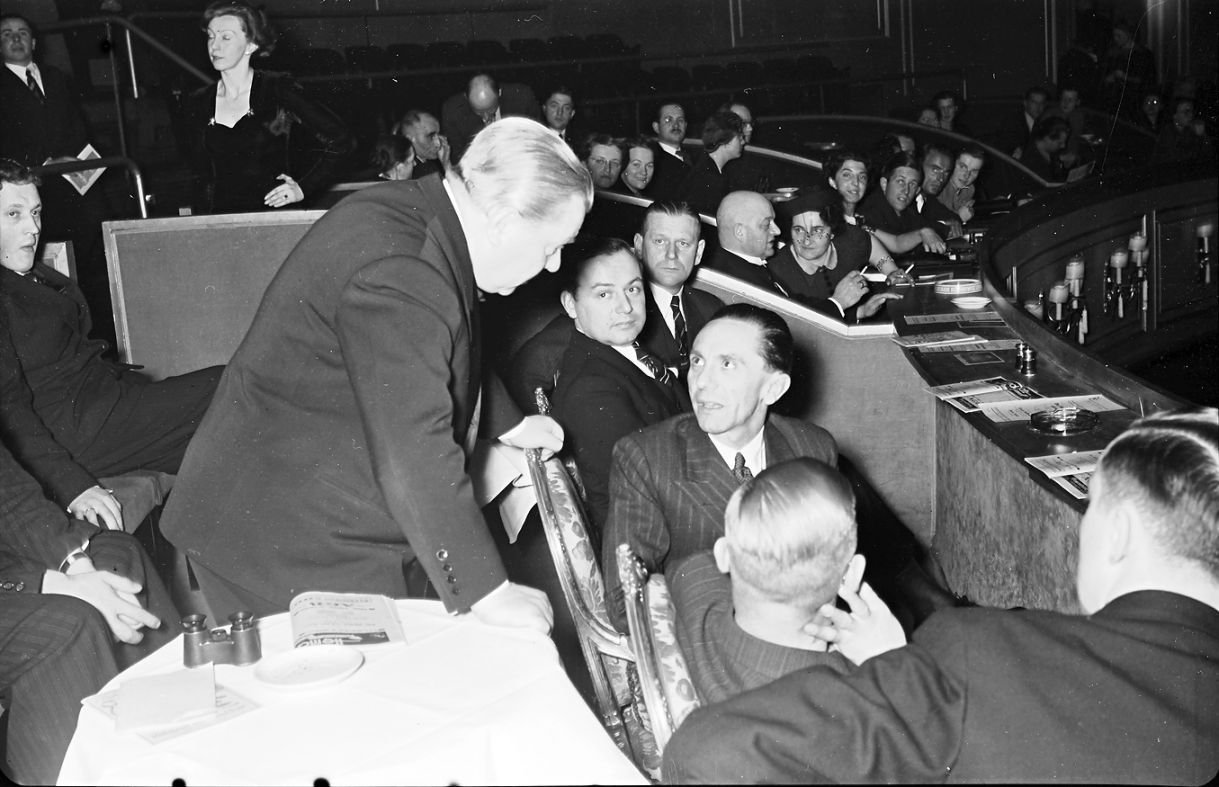 Kabarett der Komiker; in der Loge; Willi Schaeffers und Joseph Goebbels